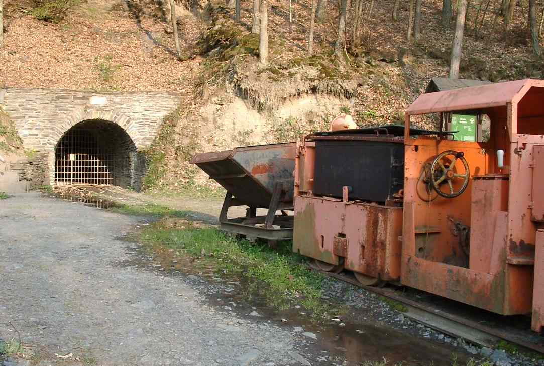 Besucherbergwerk Fell – Bergwerksbahn, die für die Errichtung des Schaubergwerks verwendet wurde